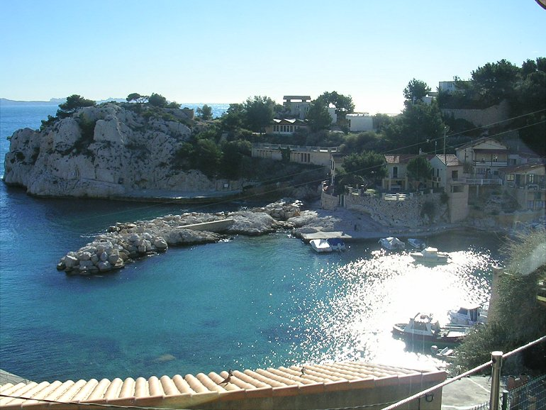 La calanque de Niolon (Le Rove, France)